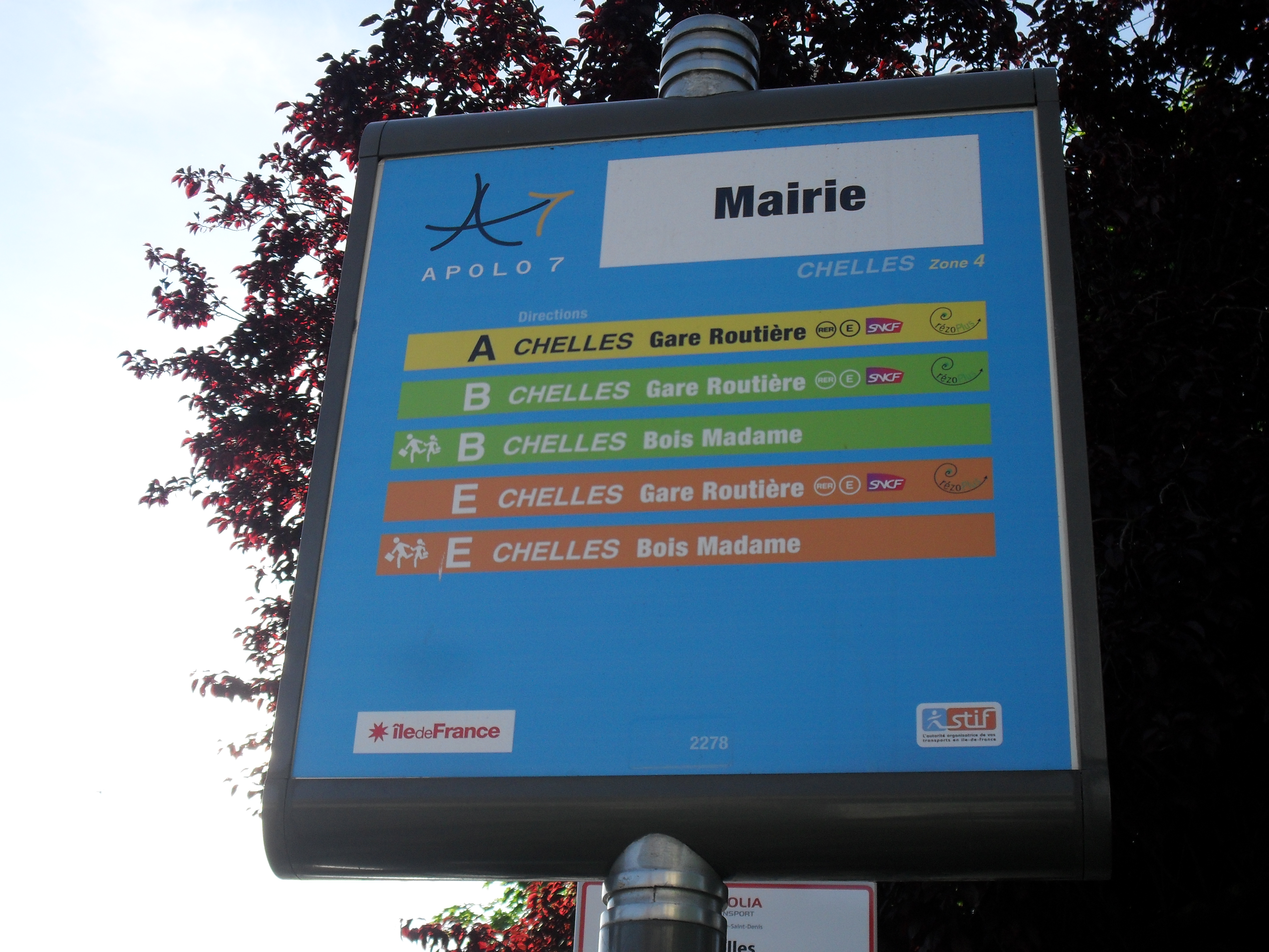 Signalétique Apolo7